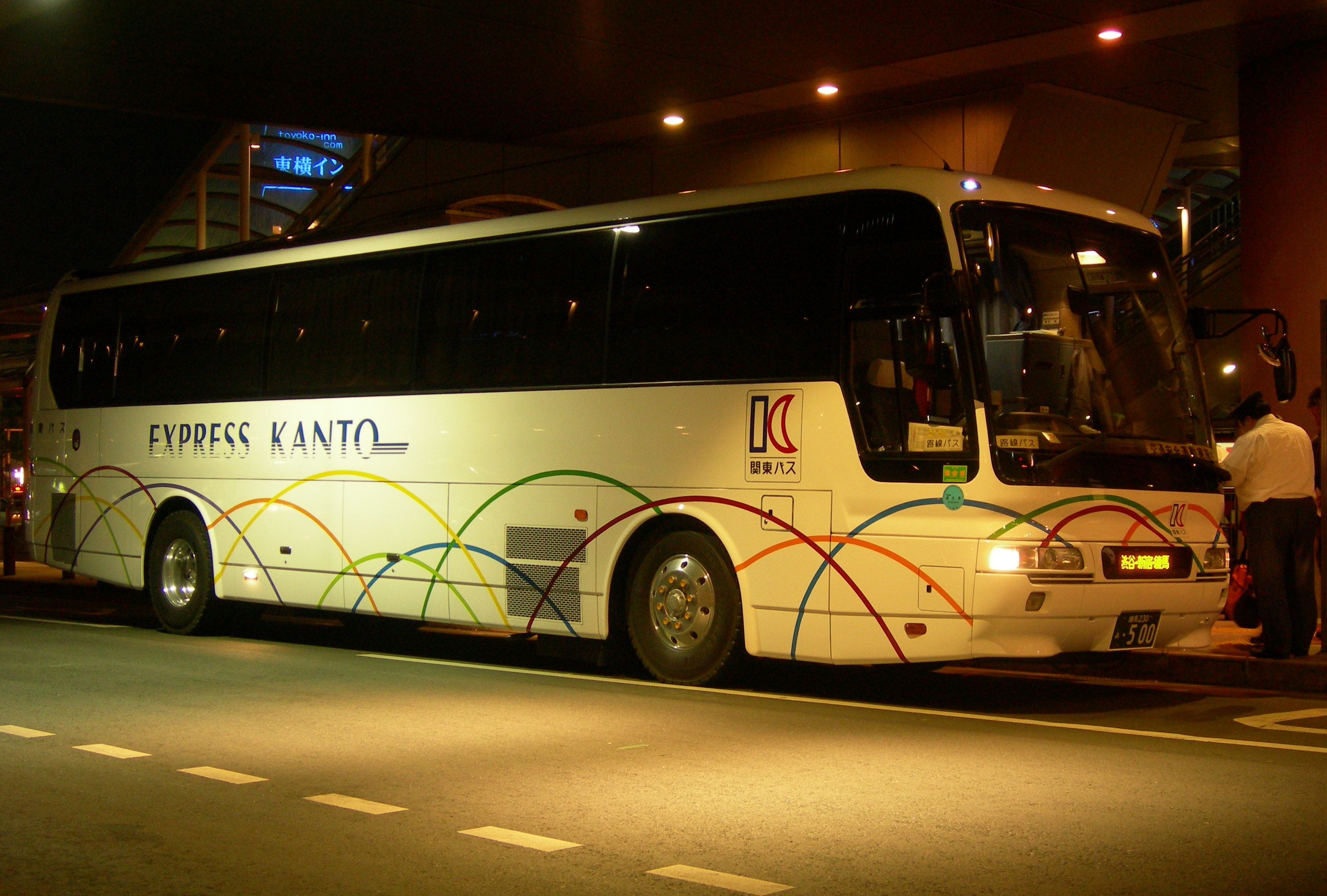 関東バス 「新宿・豊橋エクスプレス ほの国号」